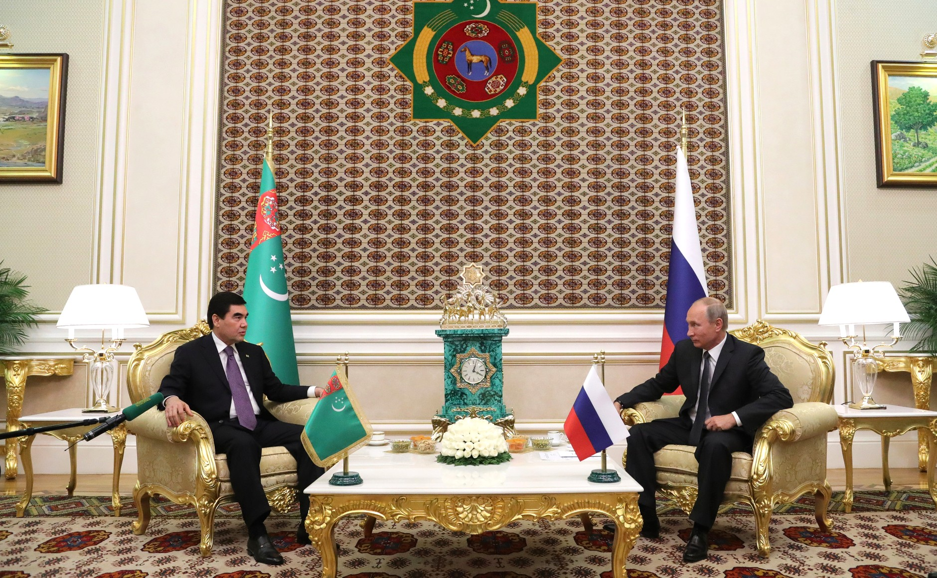 Президент России Владимир Путин с Президентом Туркменистана Гурбангулы Бердымухамедовым